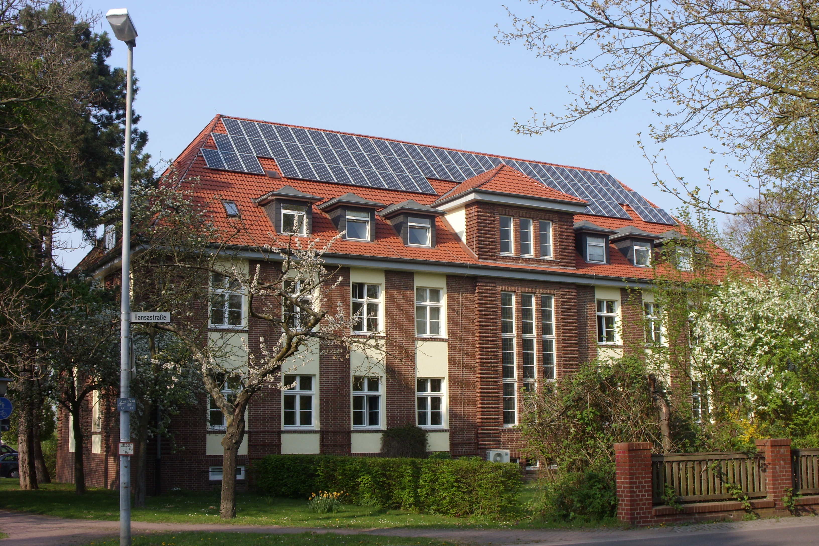 Das Rathaus der Stadt Ronnenberg im Ortsteil Empelde